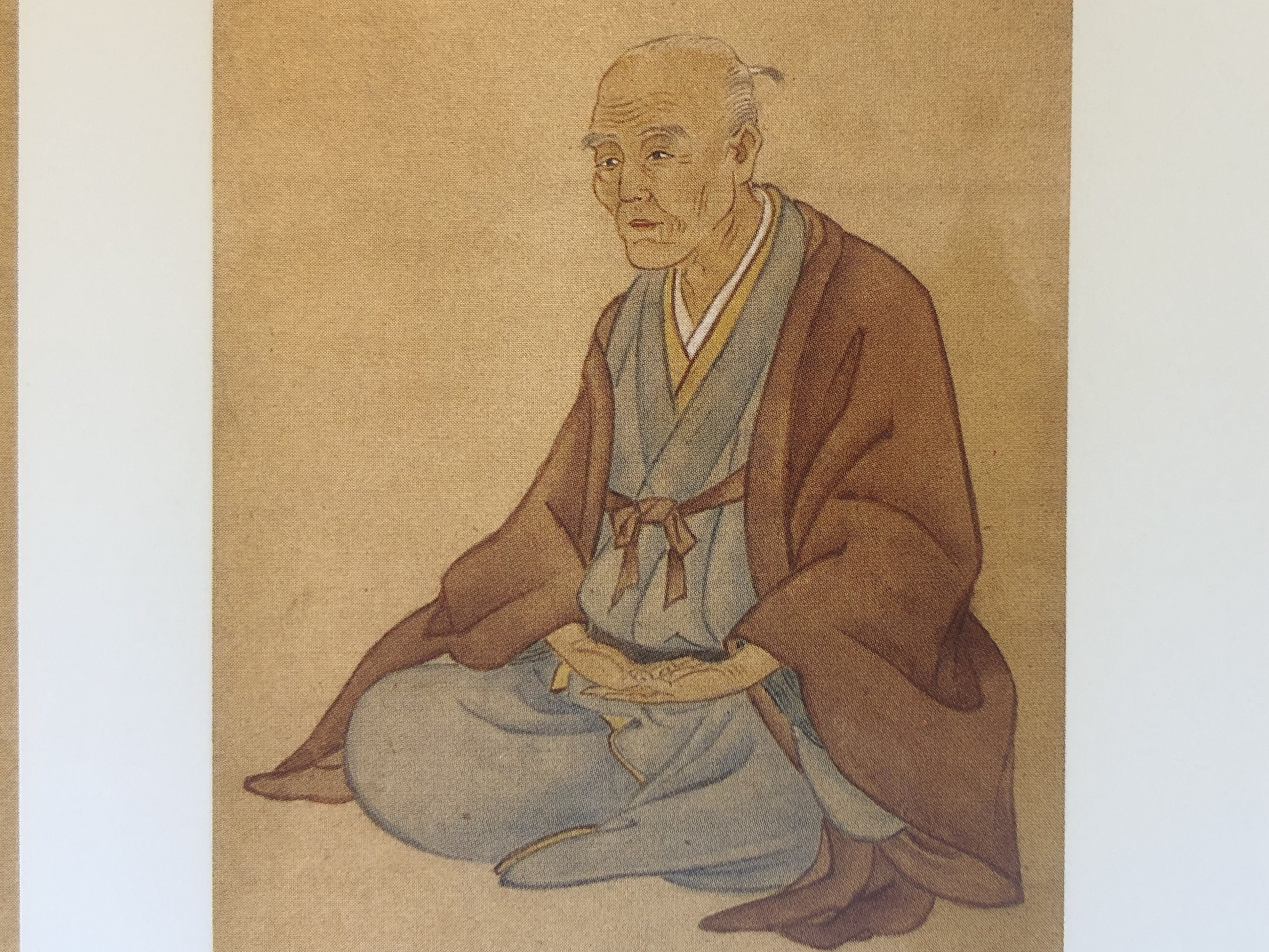 志野流家元 4代目 蜂谷宗悟